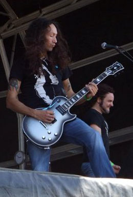 Avalanch en el Festival En Vivo 2010.